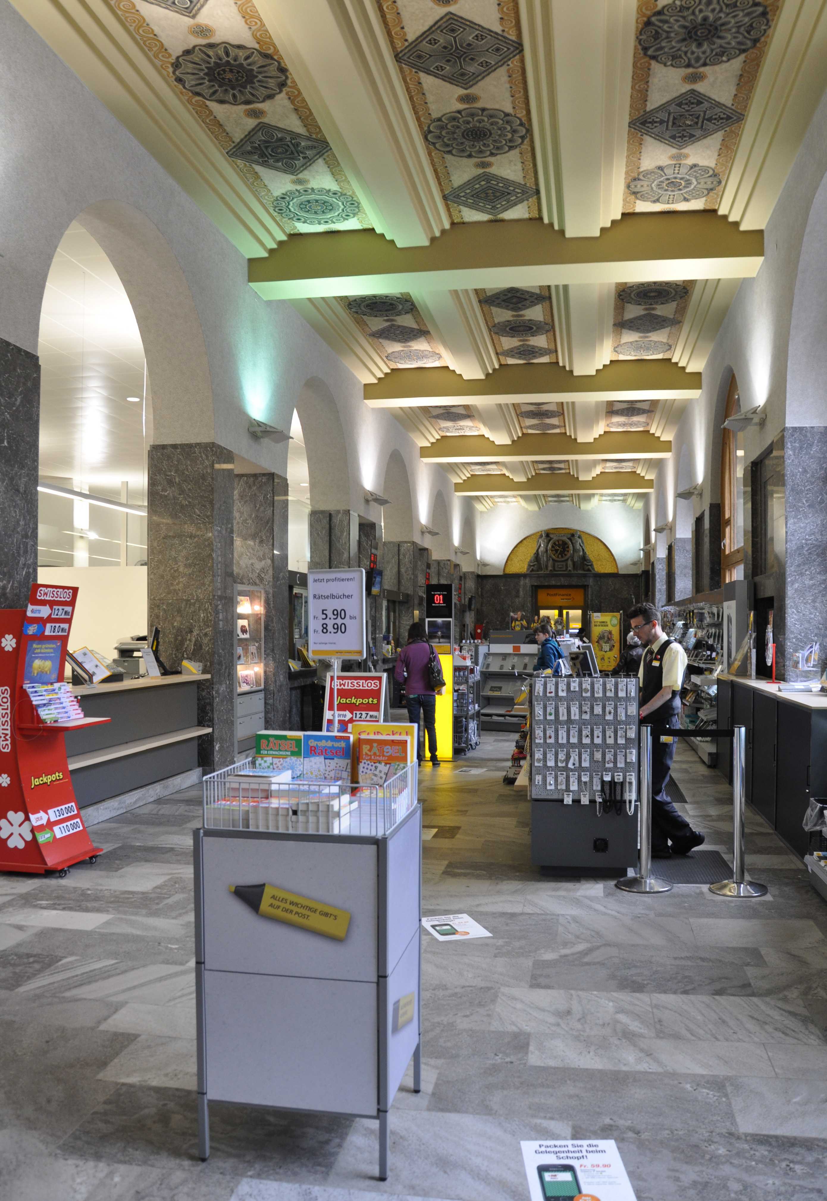 St. Gallen, Hauptpost, Innenansicht